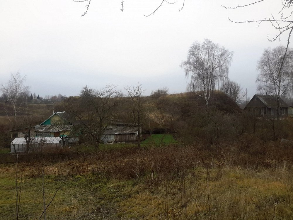 Лукомскае гарадзішча